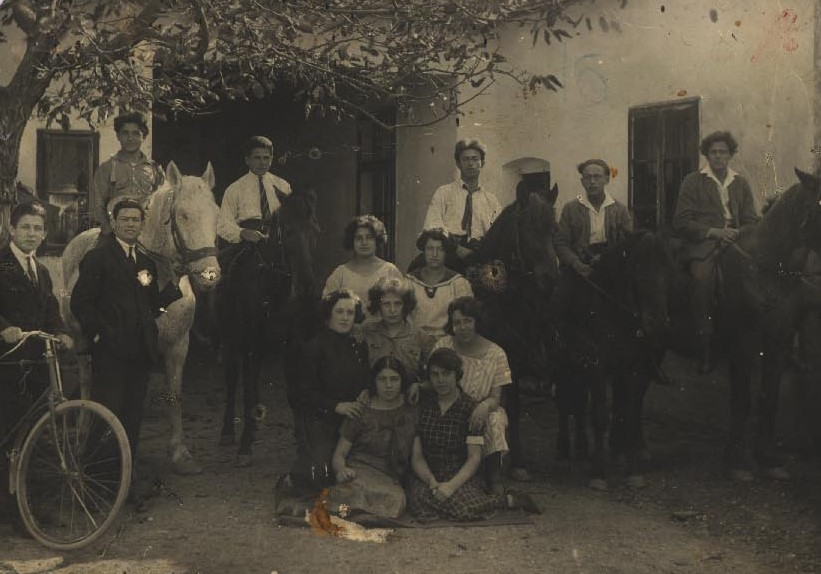 שושנה מוצ'ן (קליינר) עומדת במרכז התמונה בחולצה לבנה, ואברהם קליינר על הסוס השני מימין, בגרעין ההכשרה בחווה חקלאית בפולין